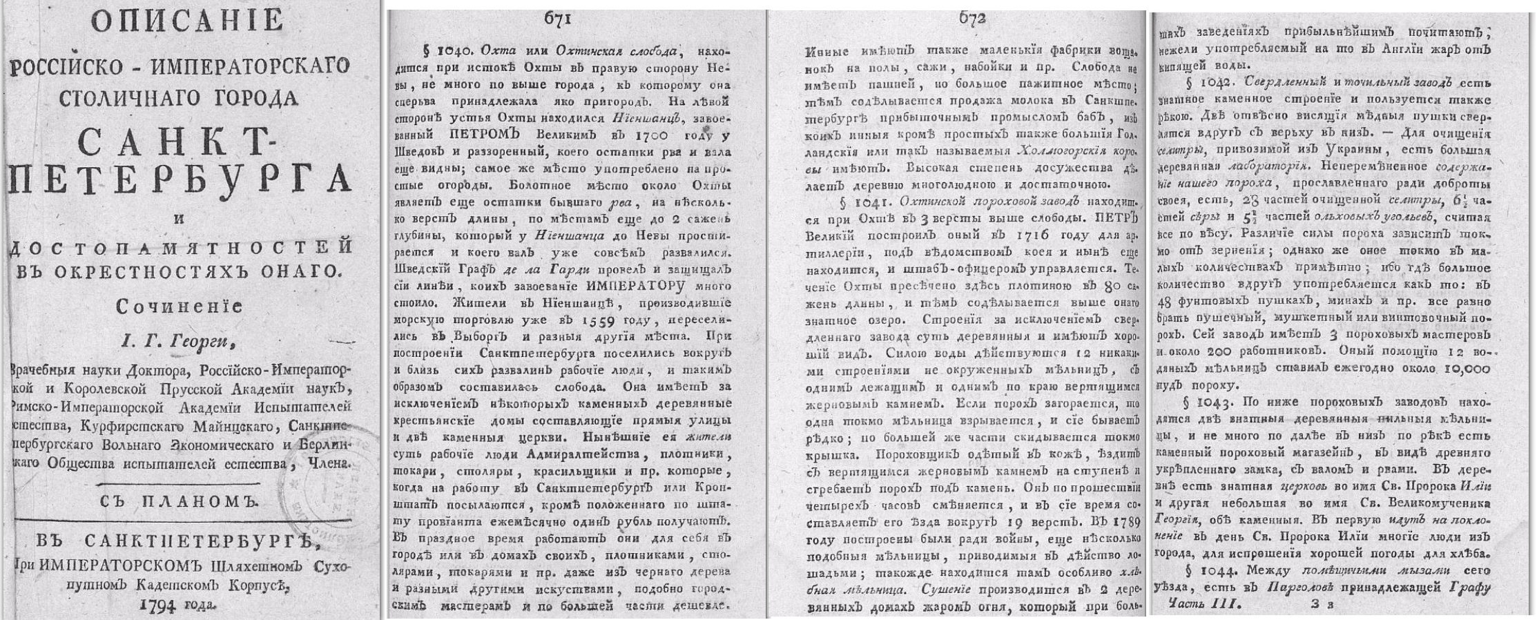 копия страниц оригинала книги